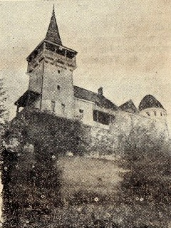 Castelul Urmanczy